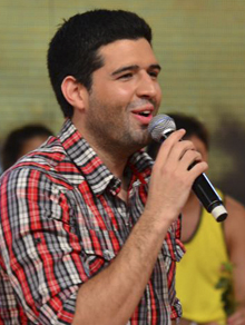 Bicho Riveros en Calle 7